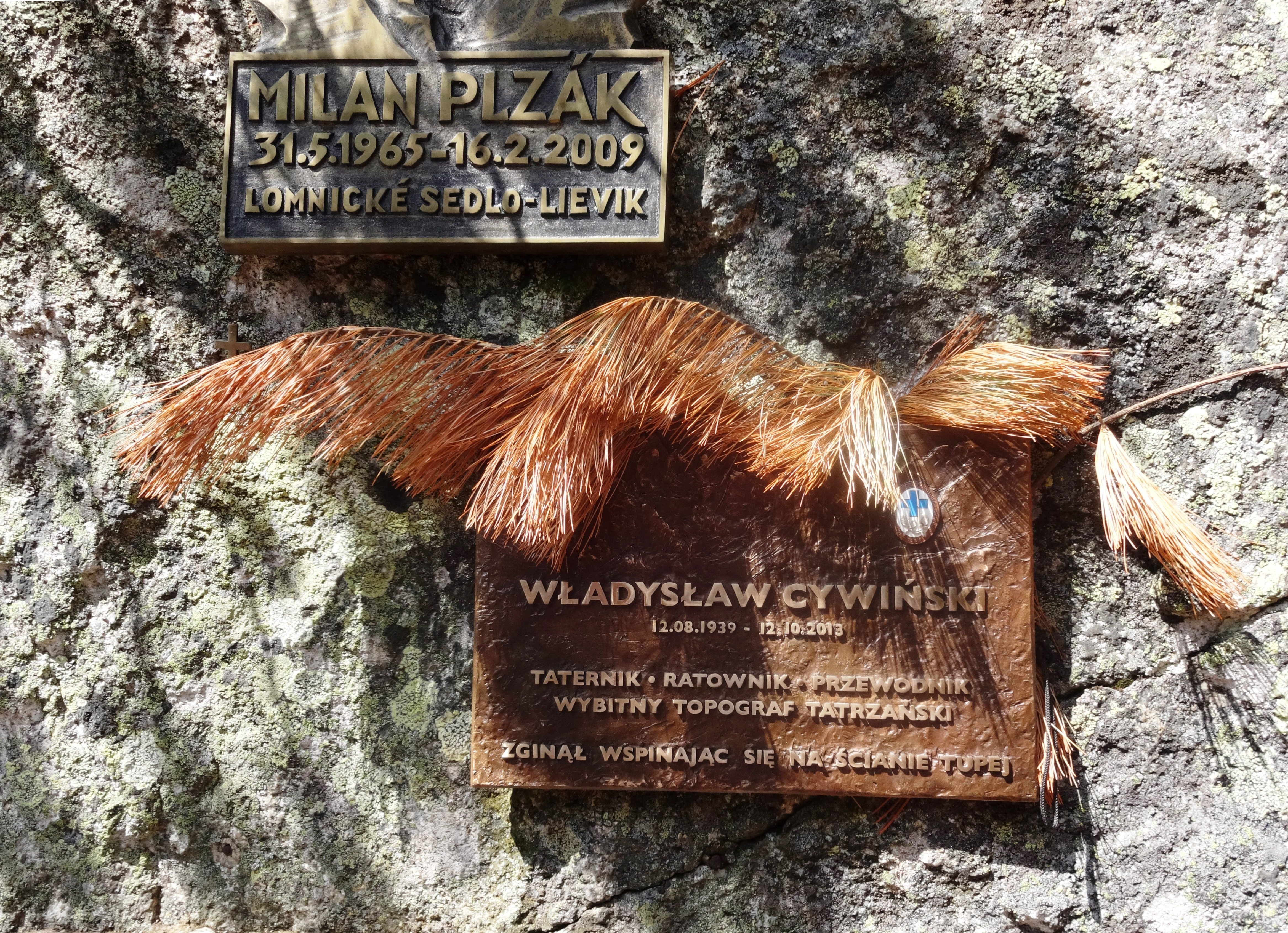 Tatrzański Cmentarz Symboliczny